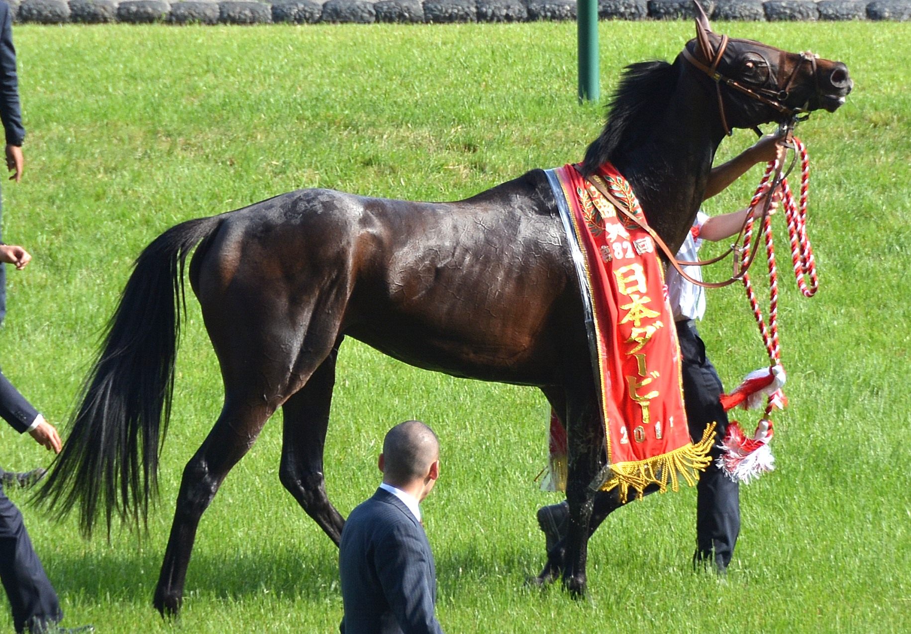 第82回東京優駿の優勝レイを着装した勝利馬ドゥラメンテを、観客席から撮影。